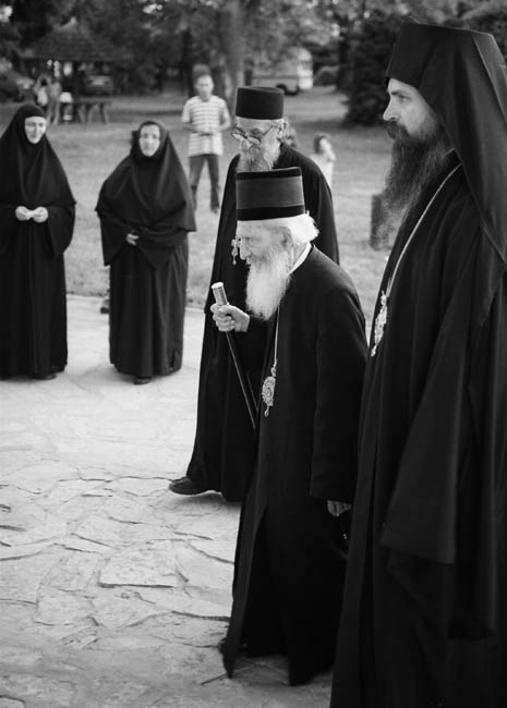 Косово и Метохија: Блаженопочивши Патријарх српски господин господин Павле у посети српском православном манастиру Грачаница. Фотографија из пројекта "Корени душе". Фото:Дарко Дозет